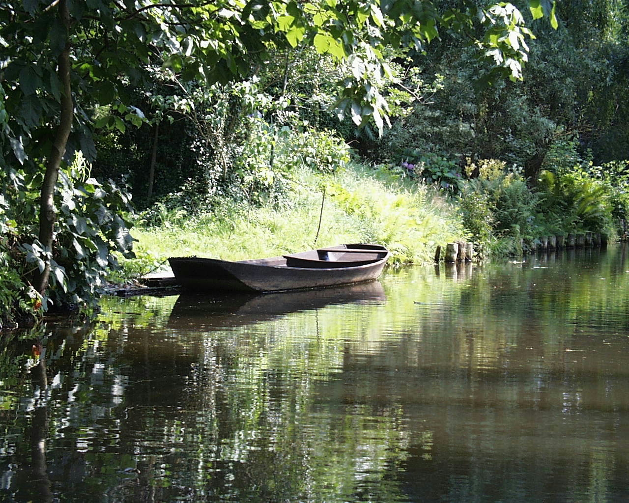 Ein Kahn im Spreewald